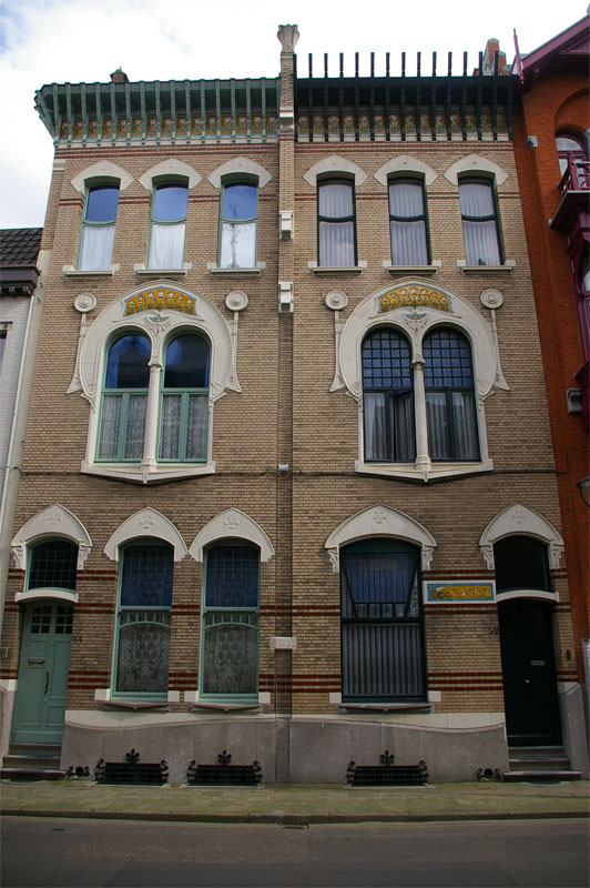 Transvaalstraat 52–54, Zurenborg area of Antwerp. "The Lotus and Papyrus" (De Lotus en Papyrus). Date: 1901. Architect: Joseph Bascourt.